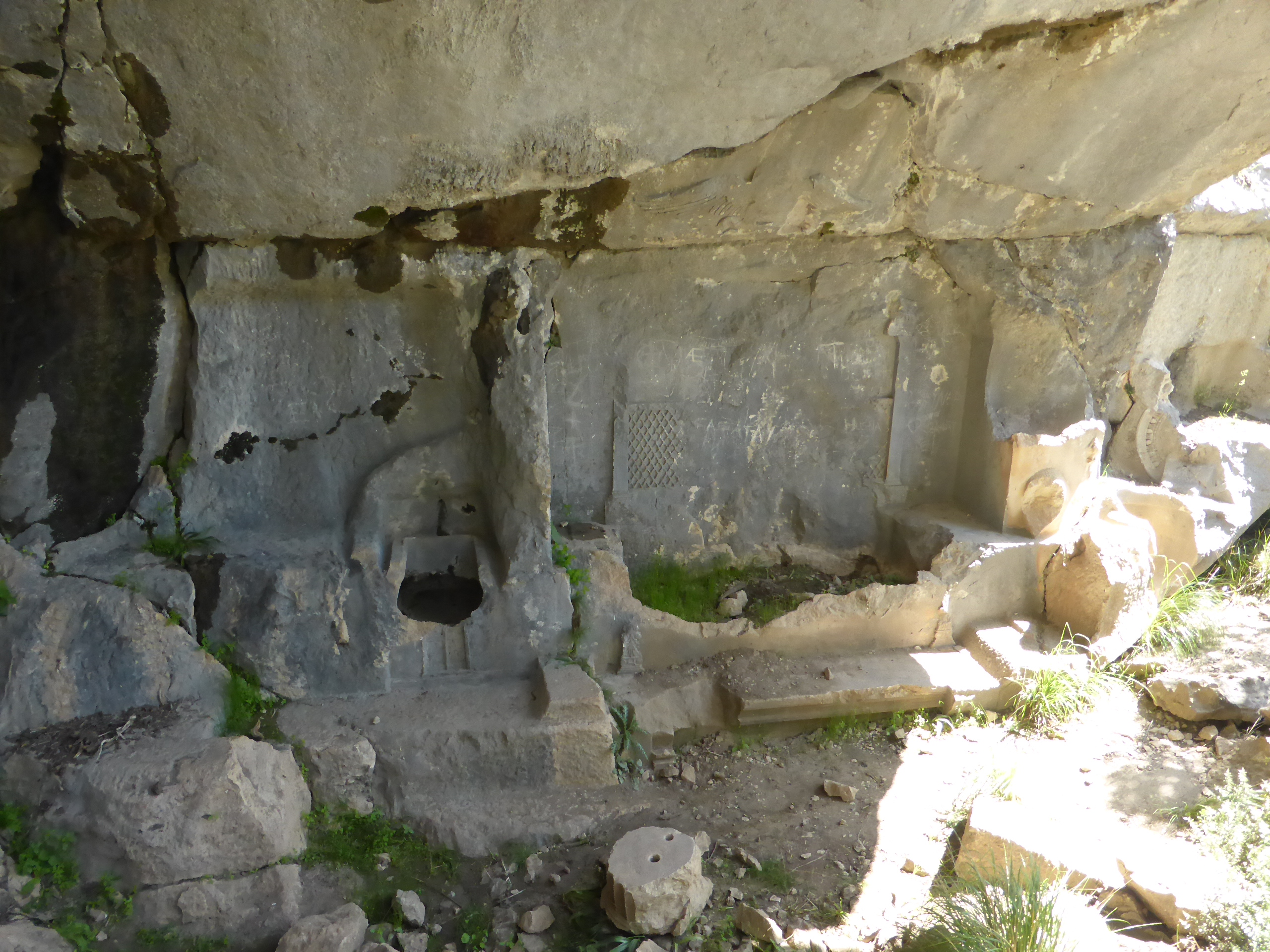 Alketasgrab, Termessos